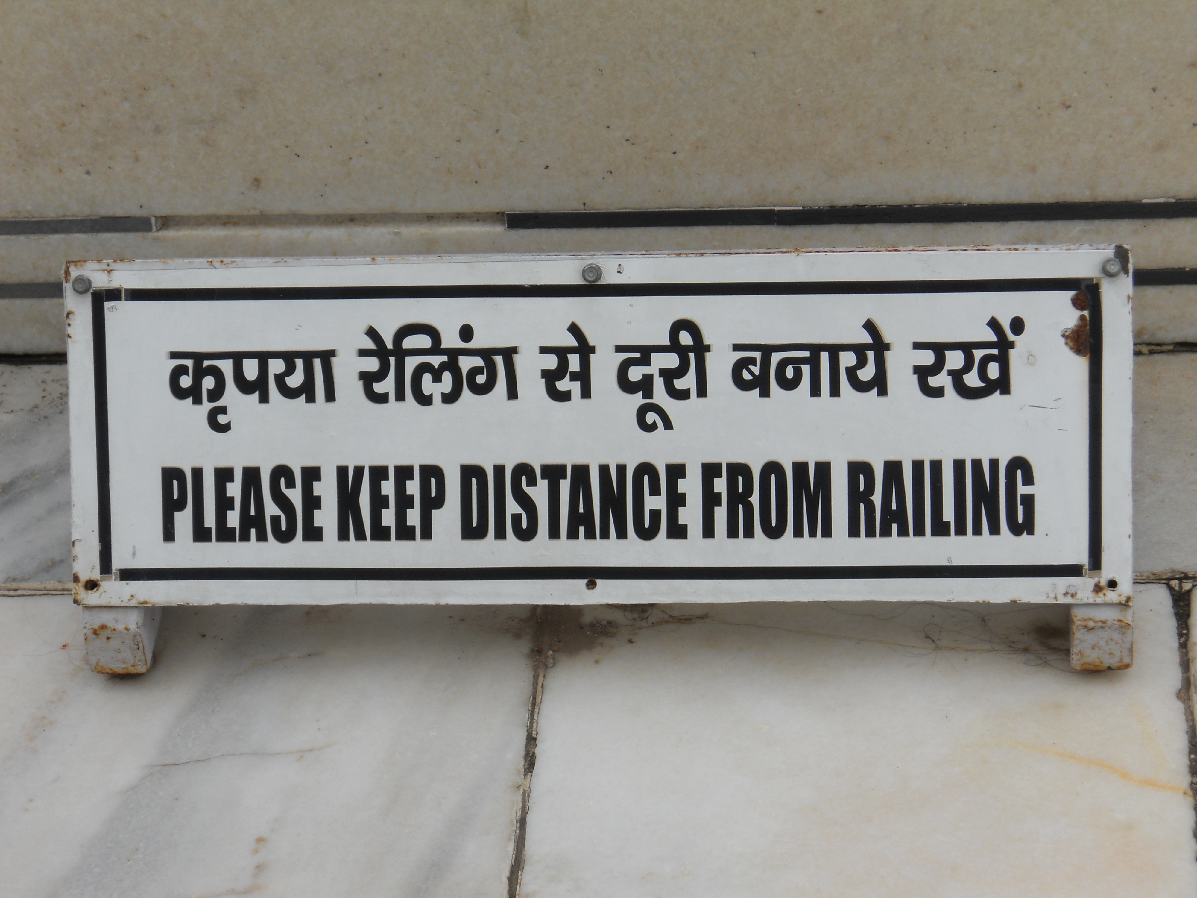 印地語和英語對照的標語